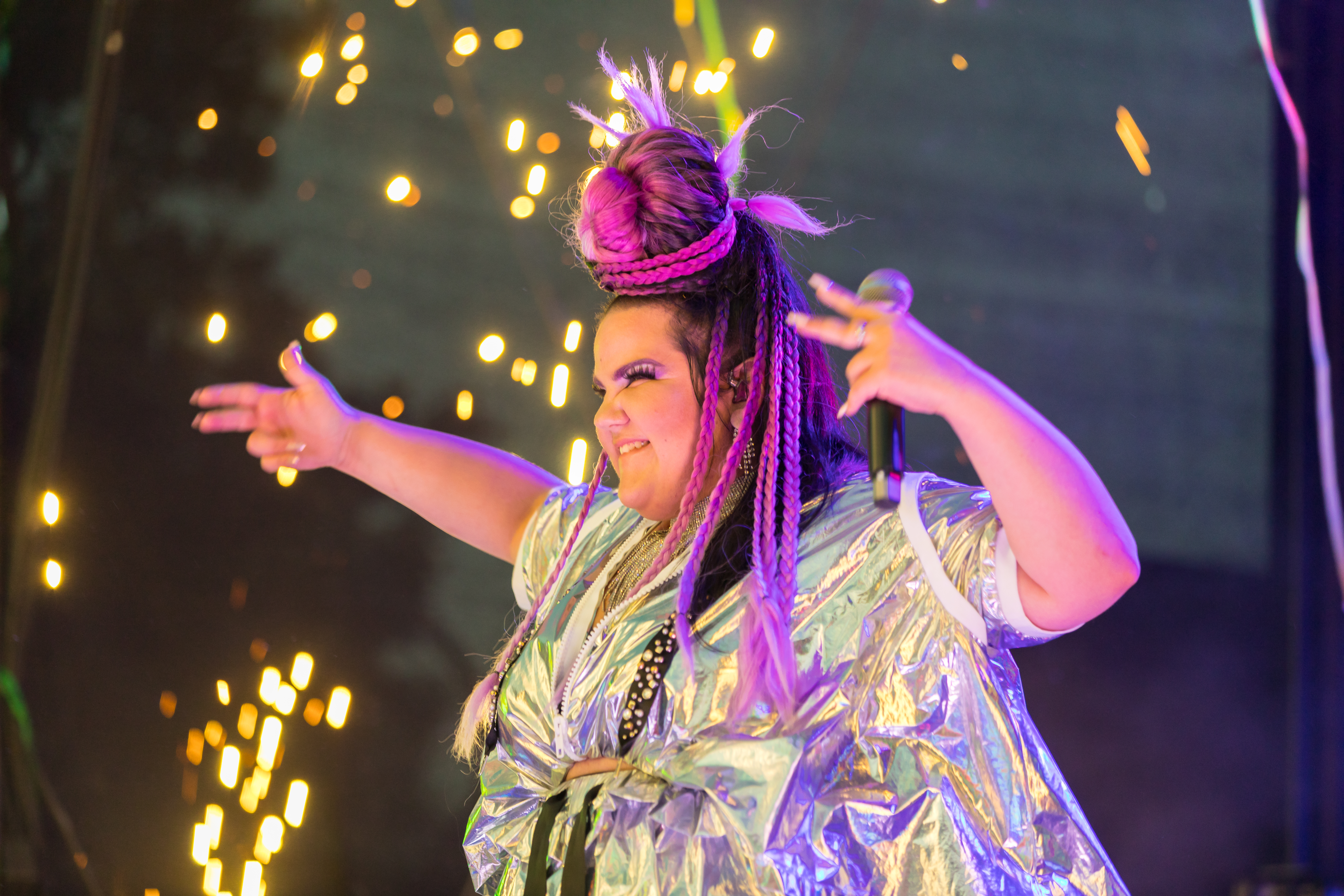 ColognePride/CSD 2018 - Auftritt von Netta Barzilai auf der Hauptbühne, Heumarkt